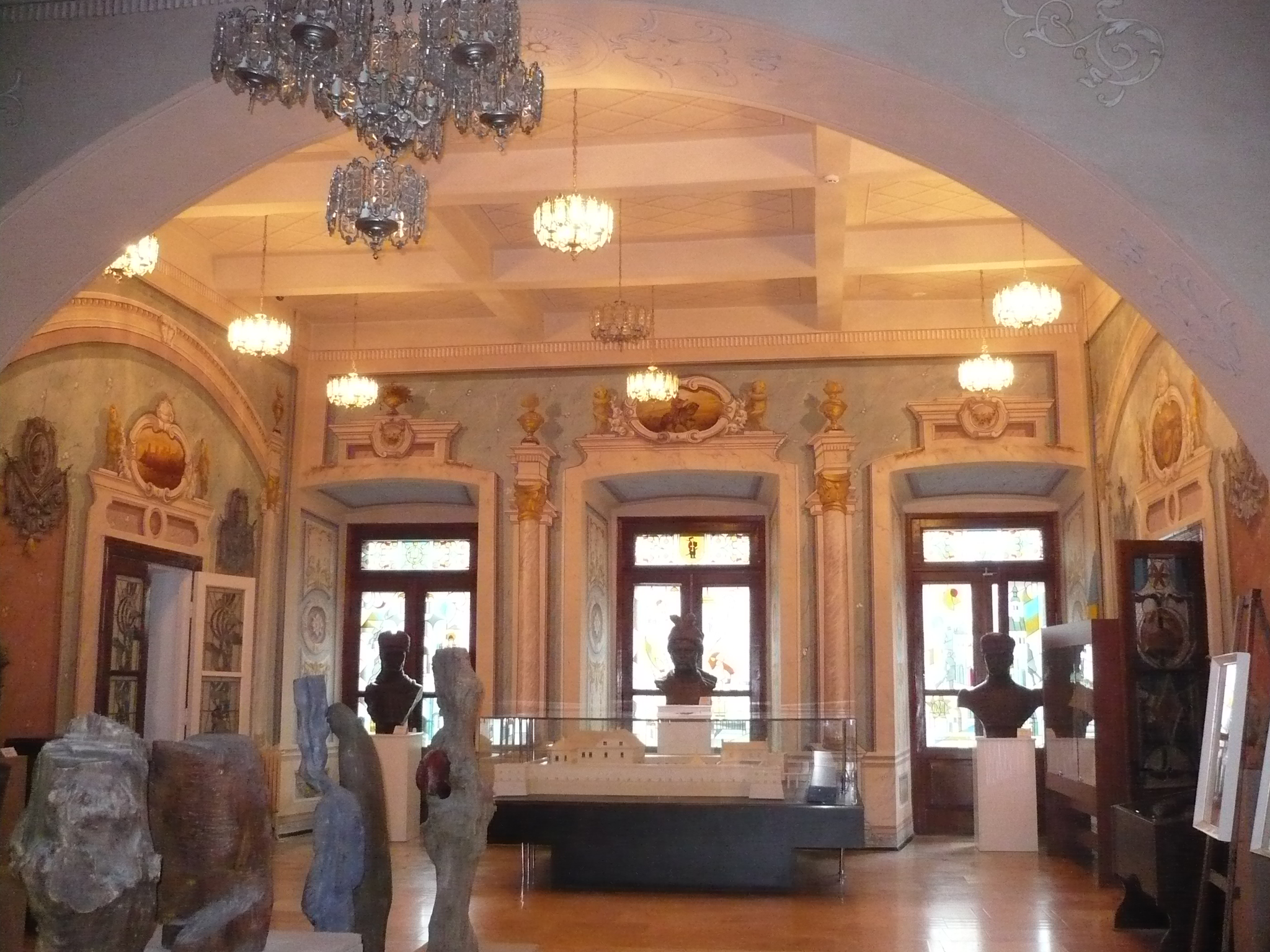 Zbaraż, sala zamku